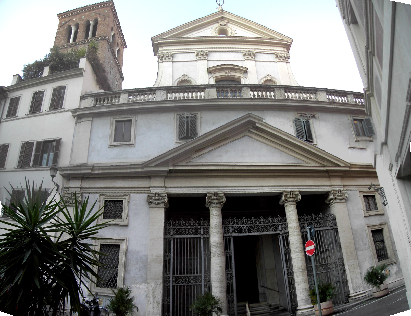 Roma , sant'Eustachio in Platana Licensing